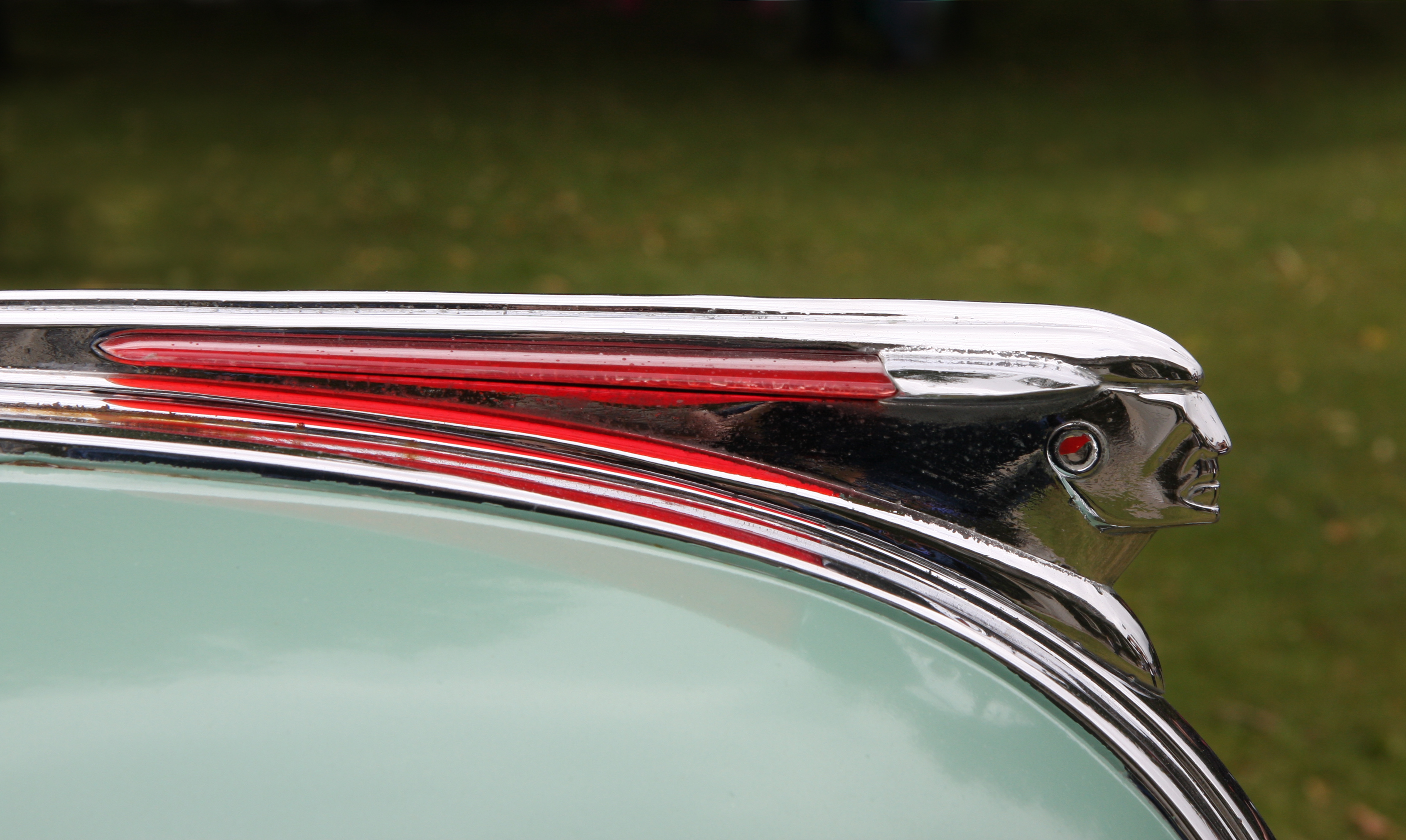 1948 Pontiac motif